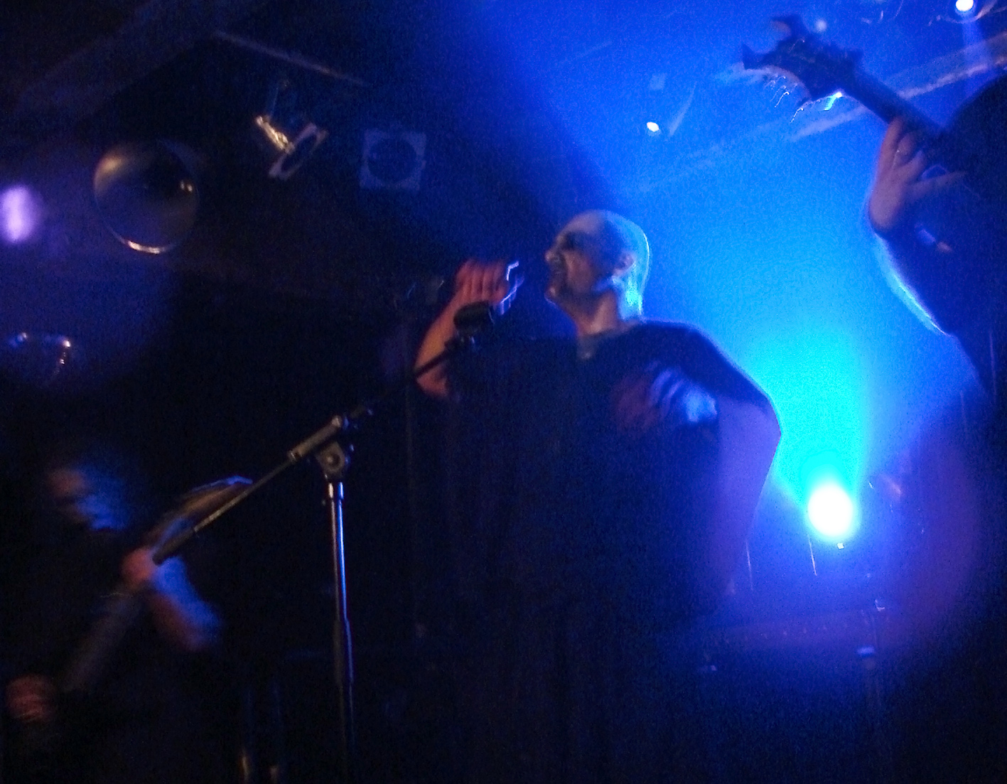 Kawir, groupe grec de Black Metal, en concert à la Locomotive, à Paris, au Cernunnos Pagan Fest 2008, organisé par les Acteurs de l'Ombre.